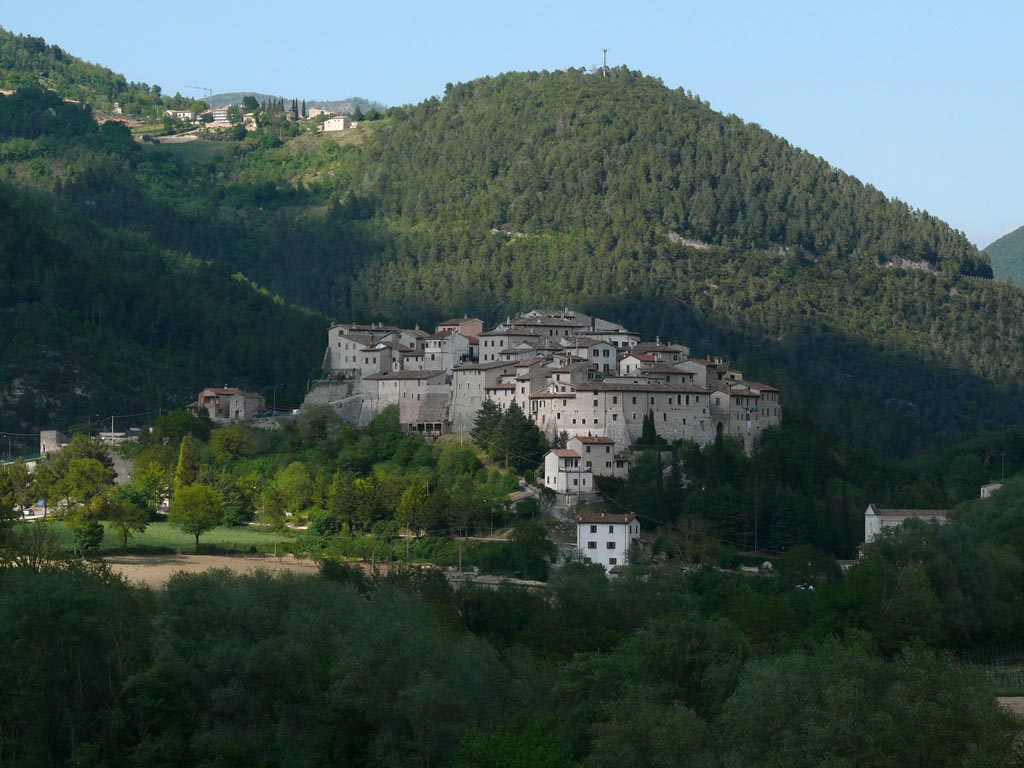 Castel San Felice, Sant'Anatolia di Narco, Perugia, Umbria, Italy, view